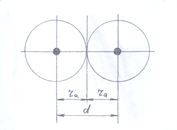 Орбитальные радиусы элементов и длина одноэлектронной химической связи